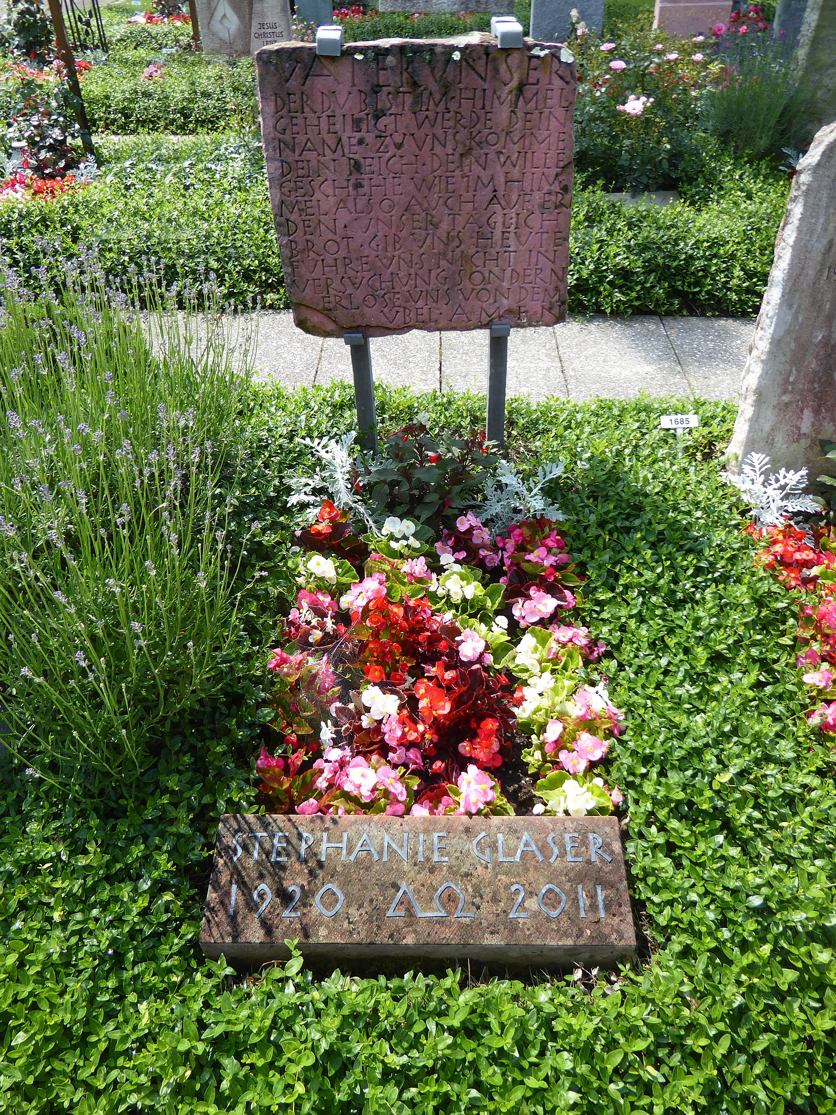 Stephanie Glaser (1920–2011) Schauspielerin. Grab auf dem Friedhof Witikon, Zürich